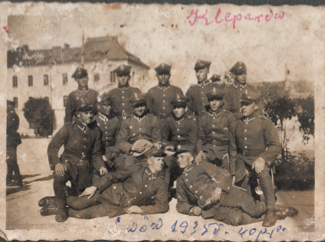 Zdjęcie pamiątkowe żołnierzy 40 pp w dzielnicy Lwowa Kleparów.